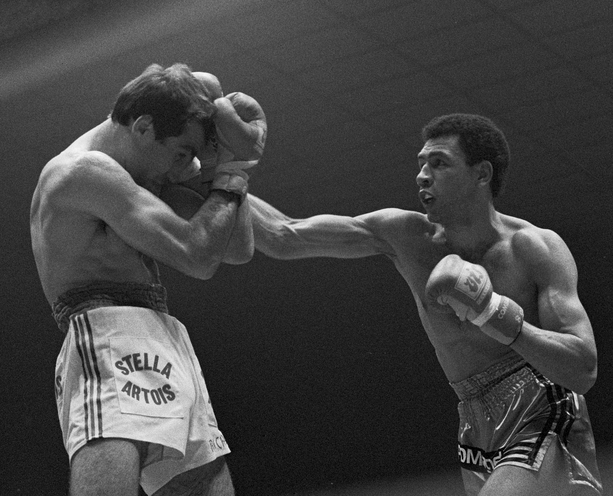 Alex Blanchard (r) bokst in Rotterdam tegen Caramanolis om Europese titel halfzwaargewicht